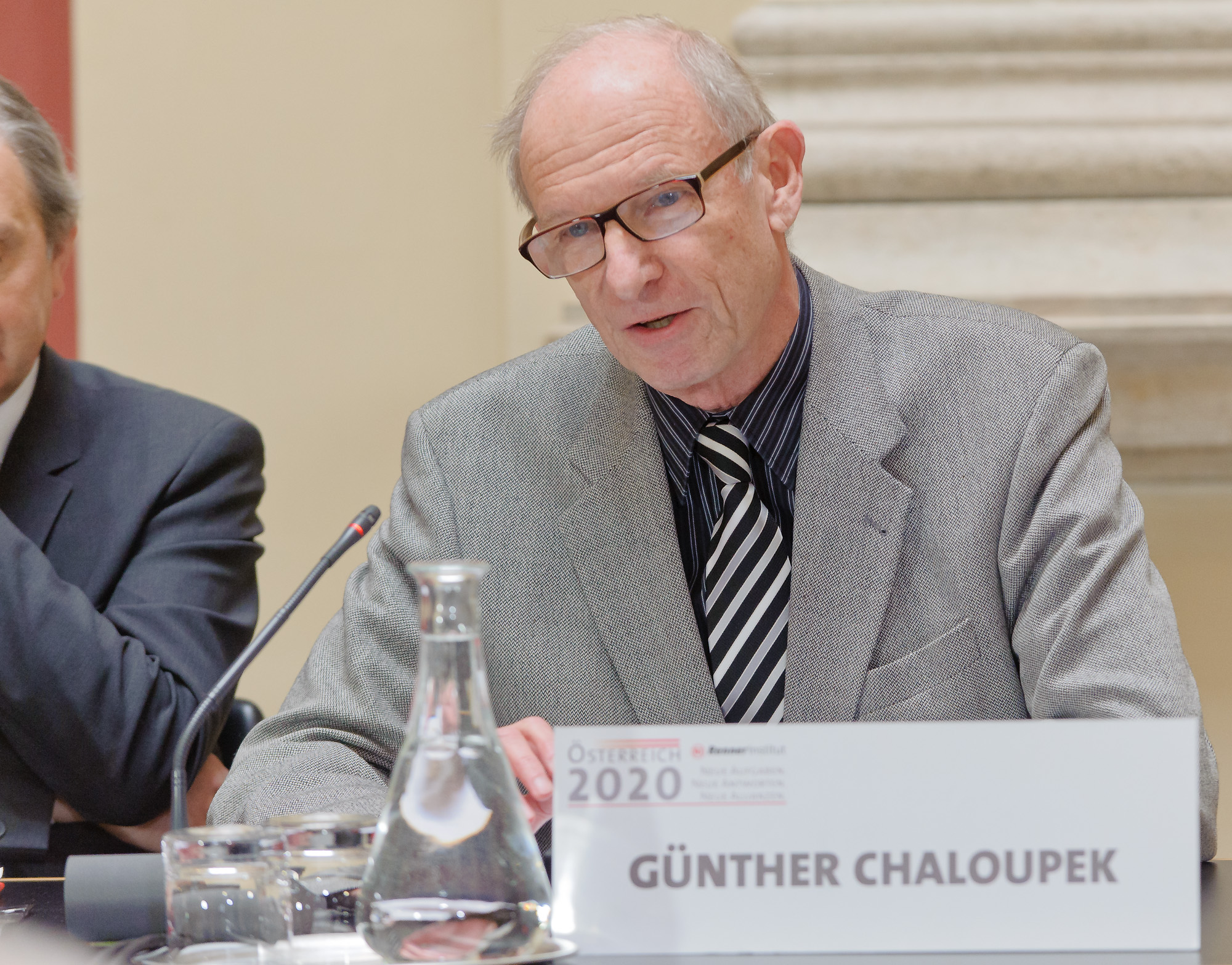 Günther Chaloupek auf der Veranstaltung: Politik und Finanzmarkt im Würgegriff der Ratingagenturen -Eine europäische Ratingagentur als Lösung? Mittwoch, 15. Februar 2012